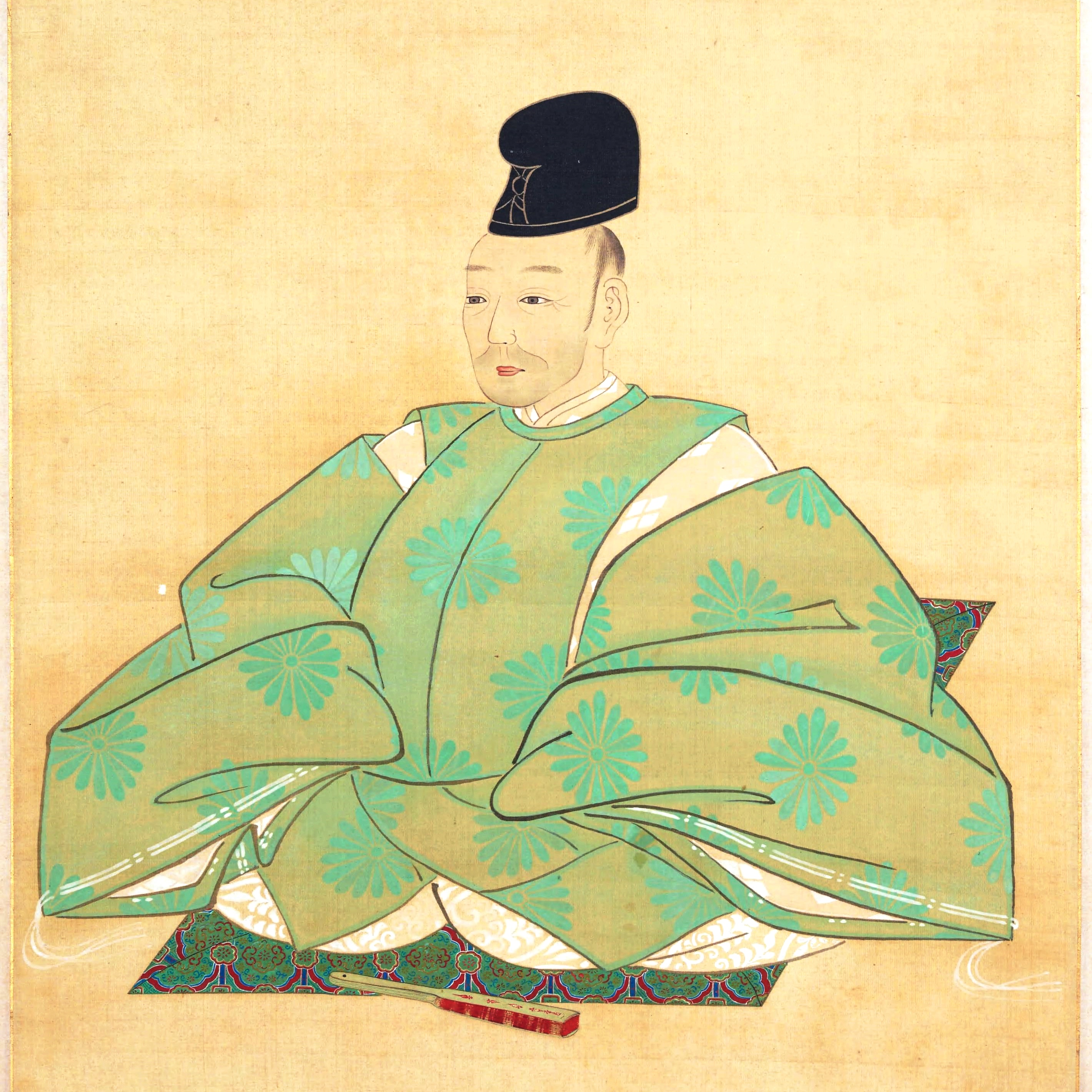 閑院宮典仁親王の肖像。